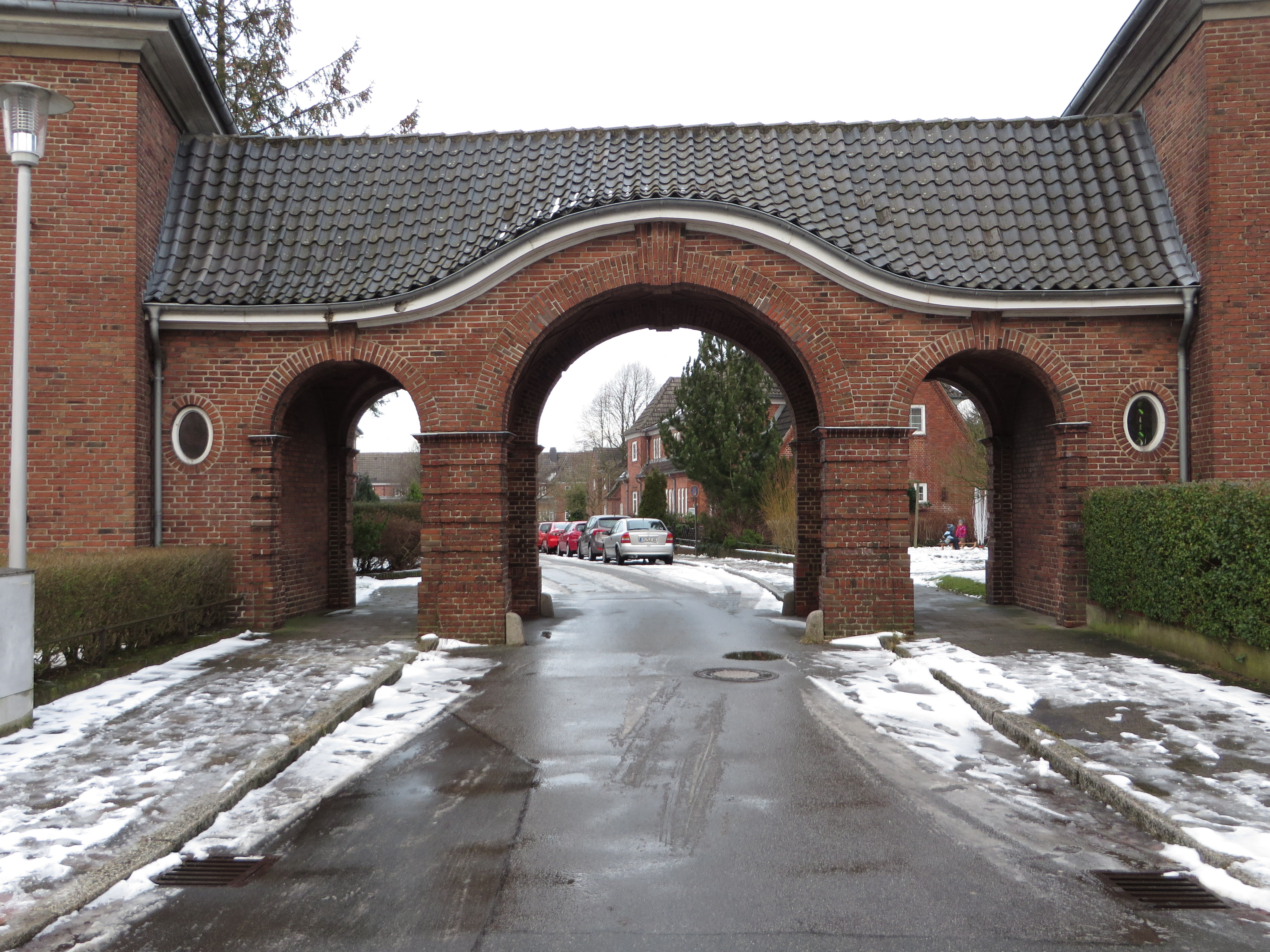 Durchfahrtstor vom Parkhof (Flensburg-Mürwik Jan 2015), Bild 03